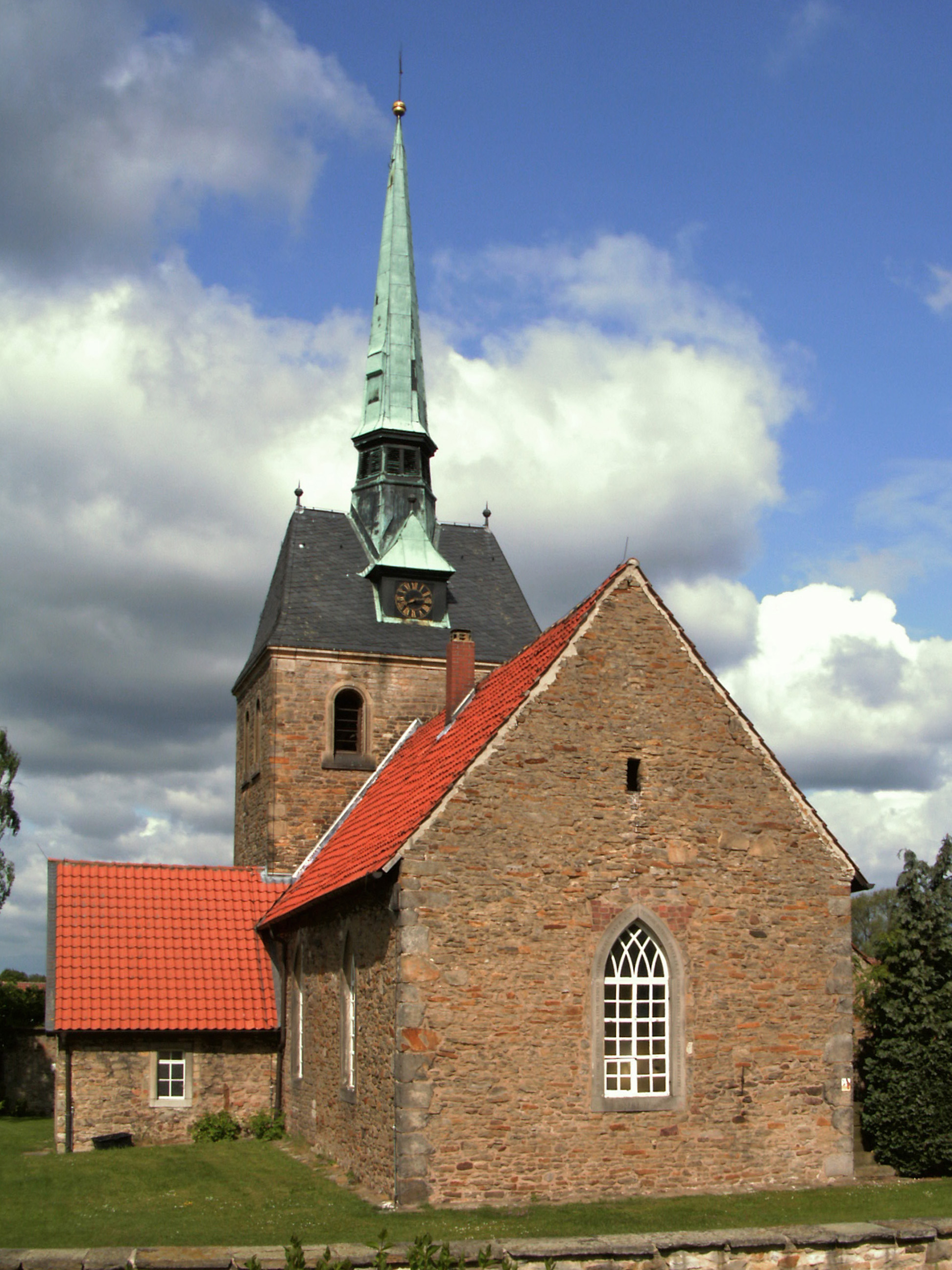 Evangelische St. Petri-Kirche in Wahrstedt, Ortsteil von Velpke, Landkreis Helmstedt.